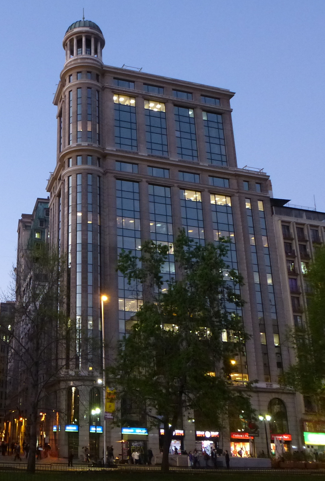 Sector calle Nueva York, La Bolsa y Club de la Unión This is a photo of a national monument in Chile: 214